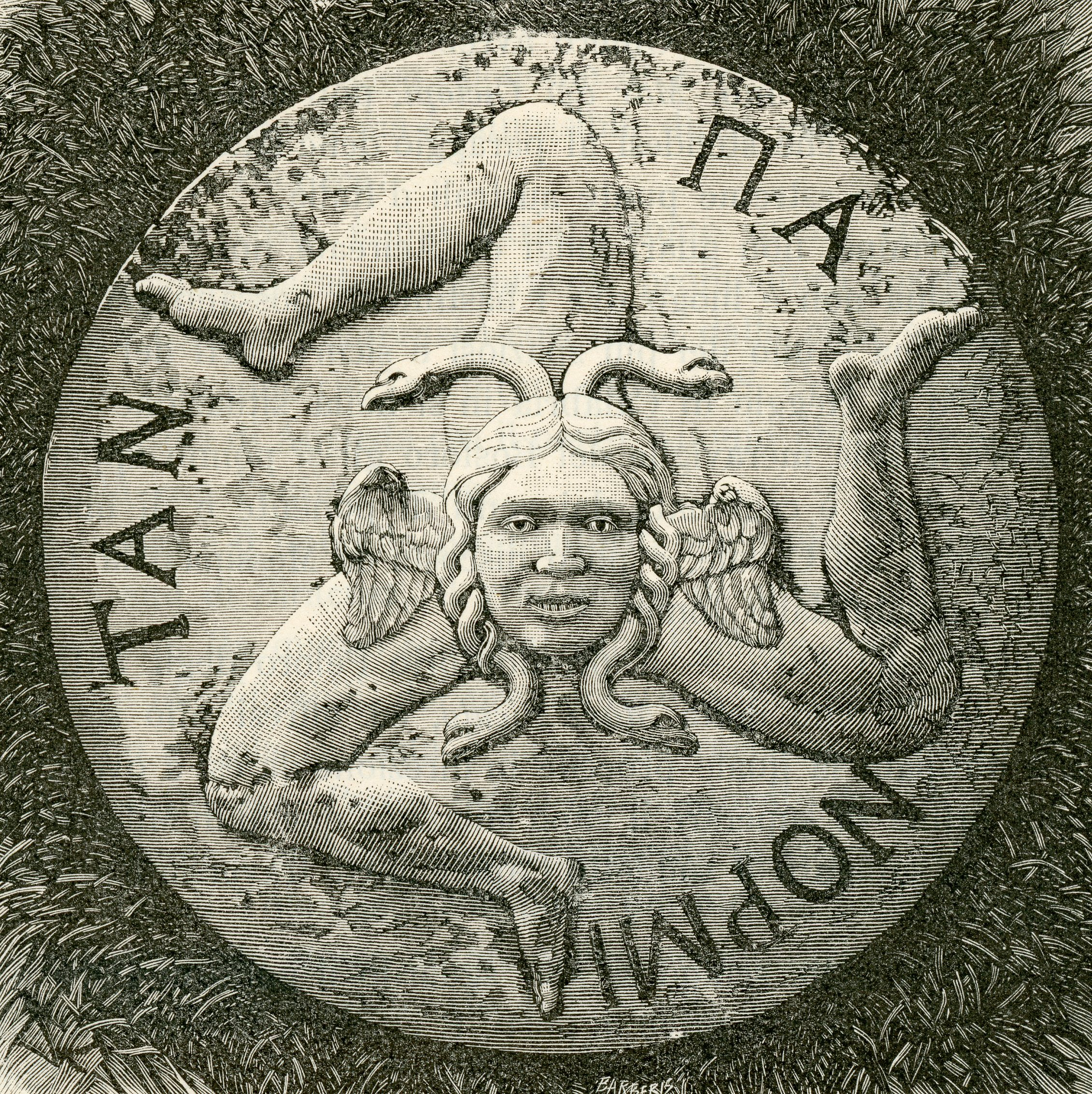 La Triscele, xilografia di Giuseppe Barberis.